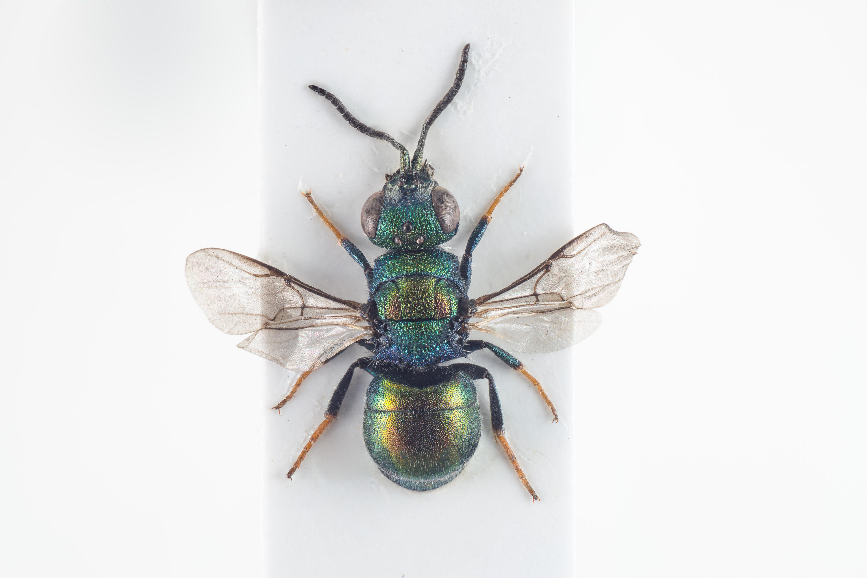 Dverggullveps Hedychridium ardens.